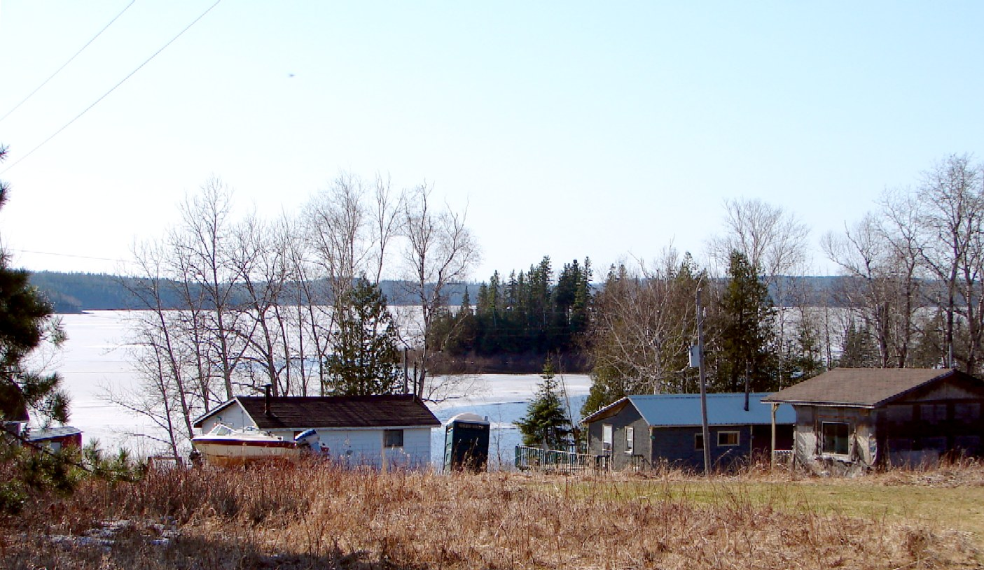 Tarzwell, Ontario, Canada